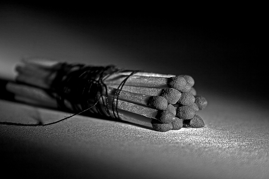 Mali TNT